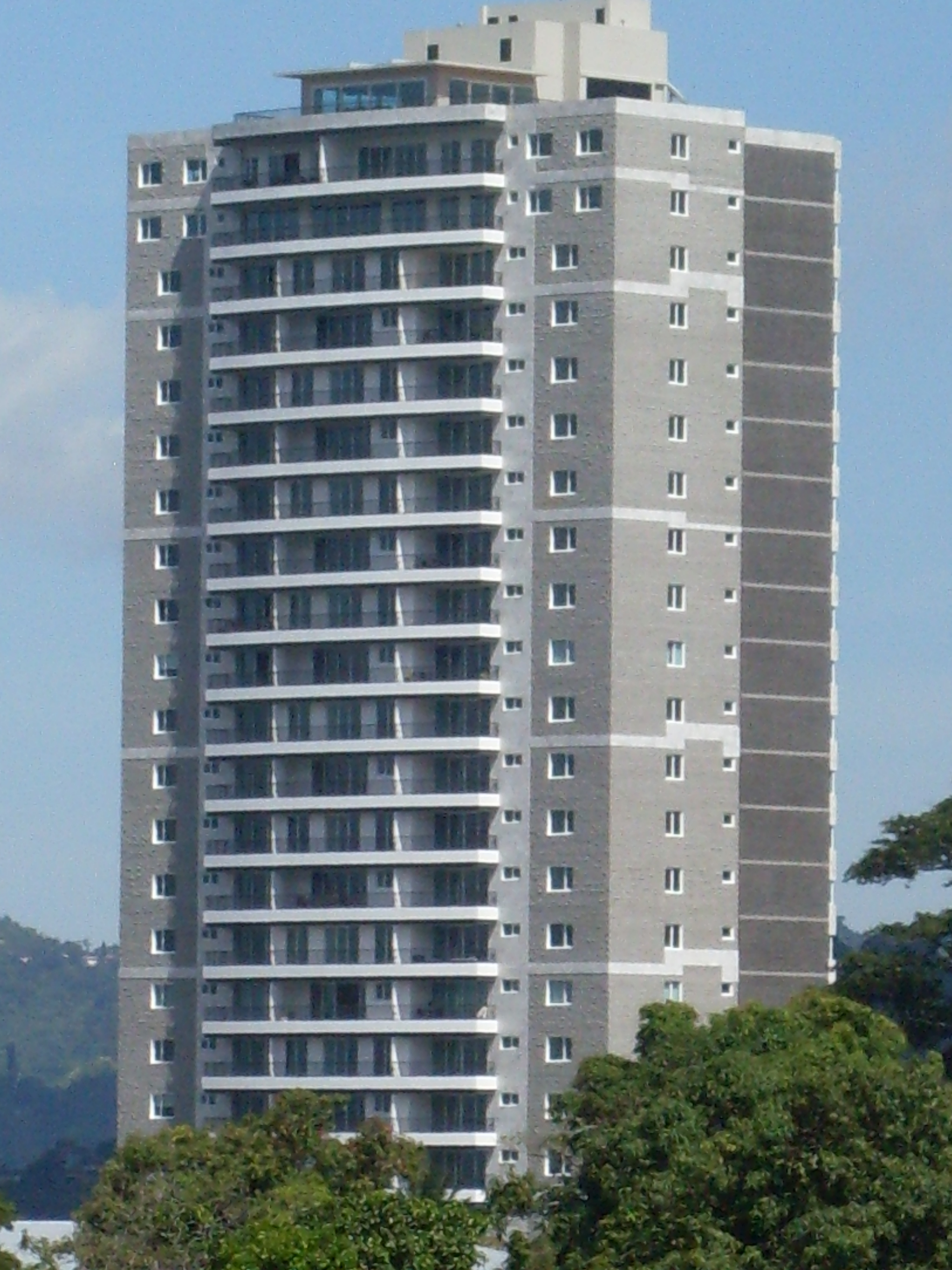 Torre Alisios 115 Acercamiento